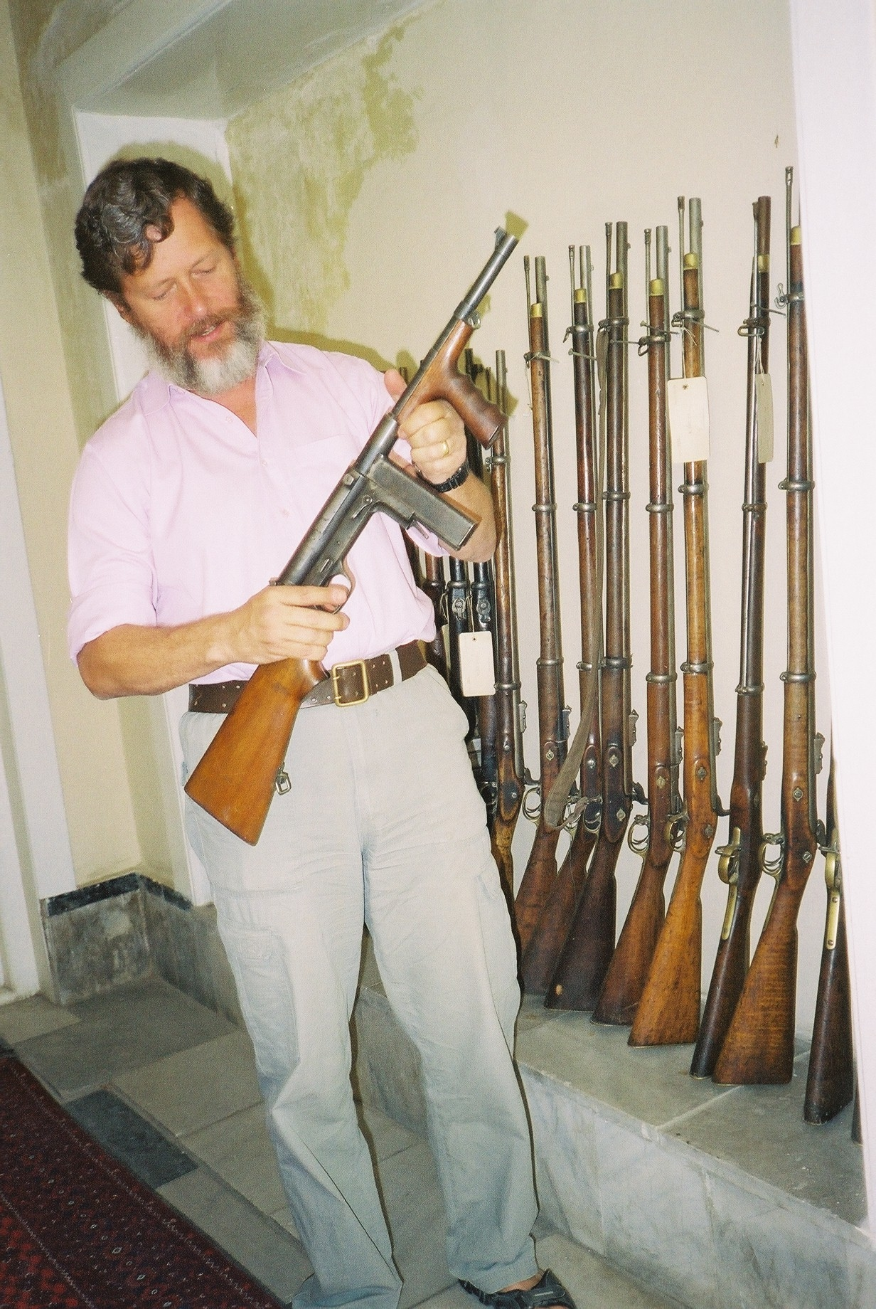 Peter Jouvenal BBC Camerman in Kabul, Afghanistan 2005